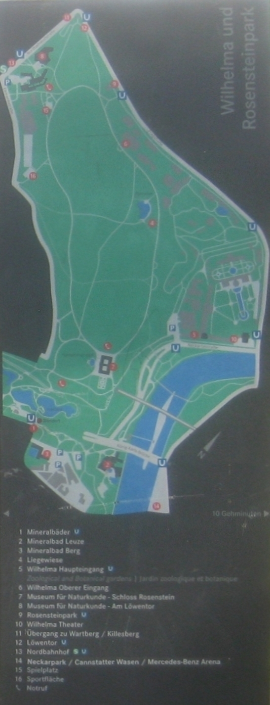 Hinweistafel „Wilhelma und Rosensteinpark“ (Ausschnitt), nach der Stadtbahnhaltestelle Mineralbäder am Eingang zum Rosensteinpark.